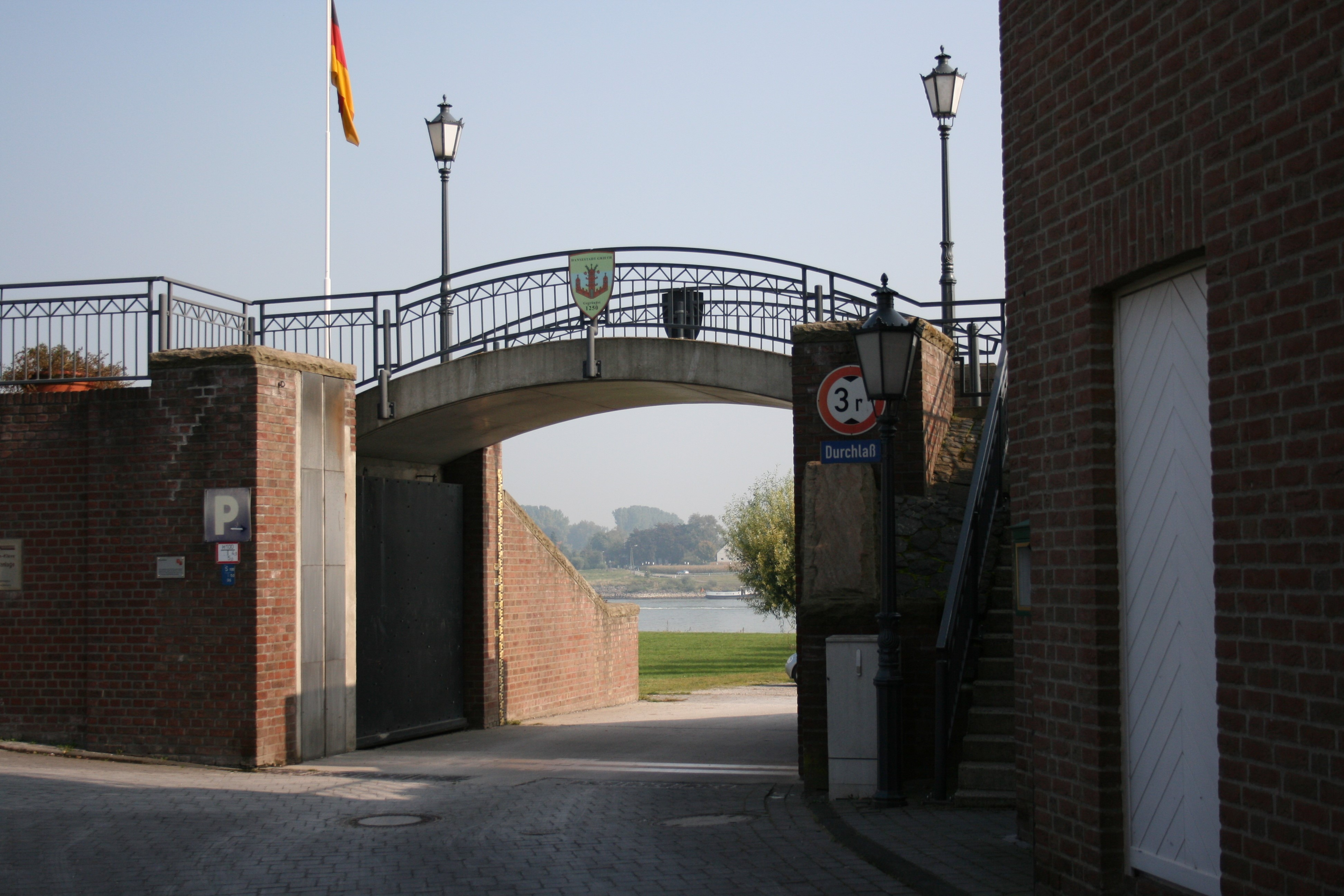 Deich mit Durchlass in Kalkar-Grieth